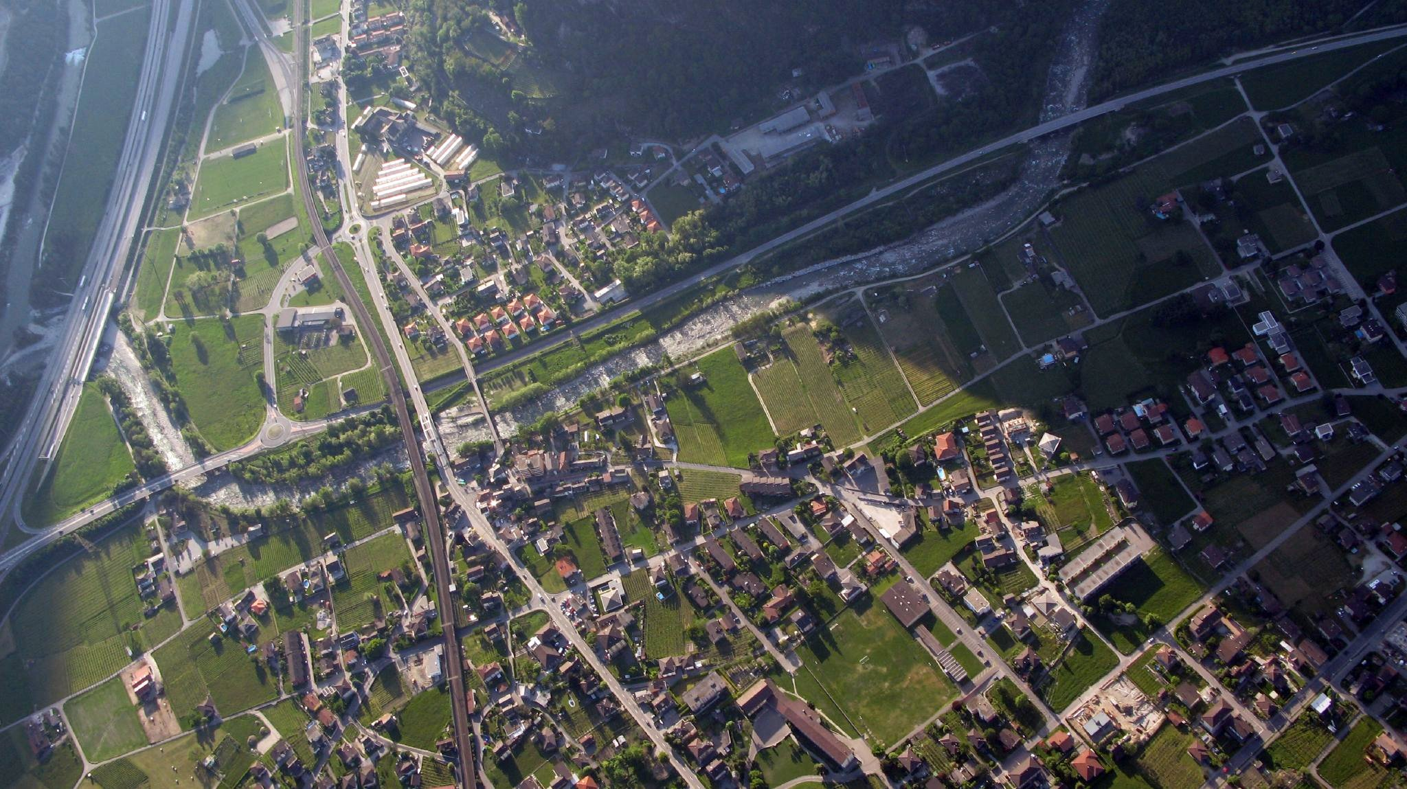 Biasca